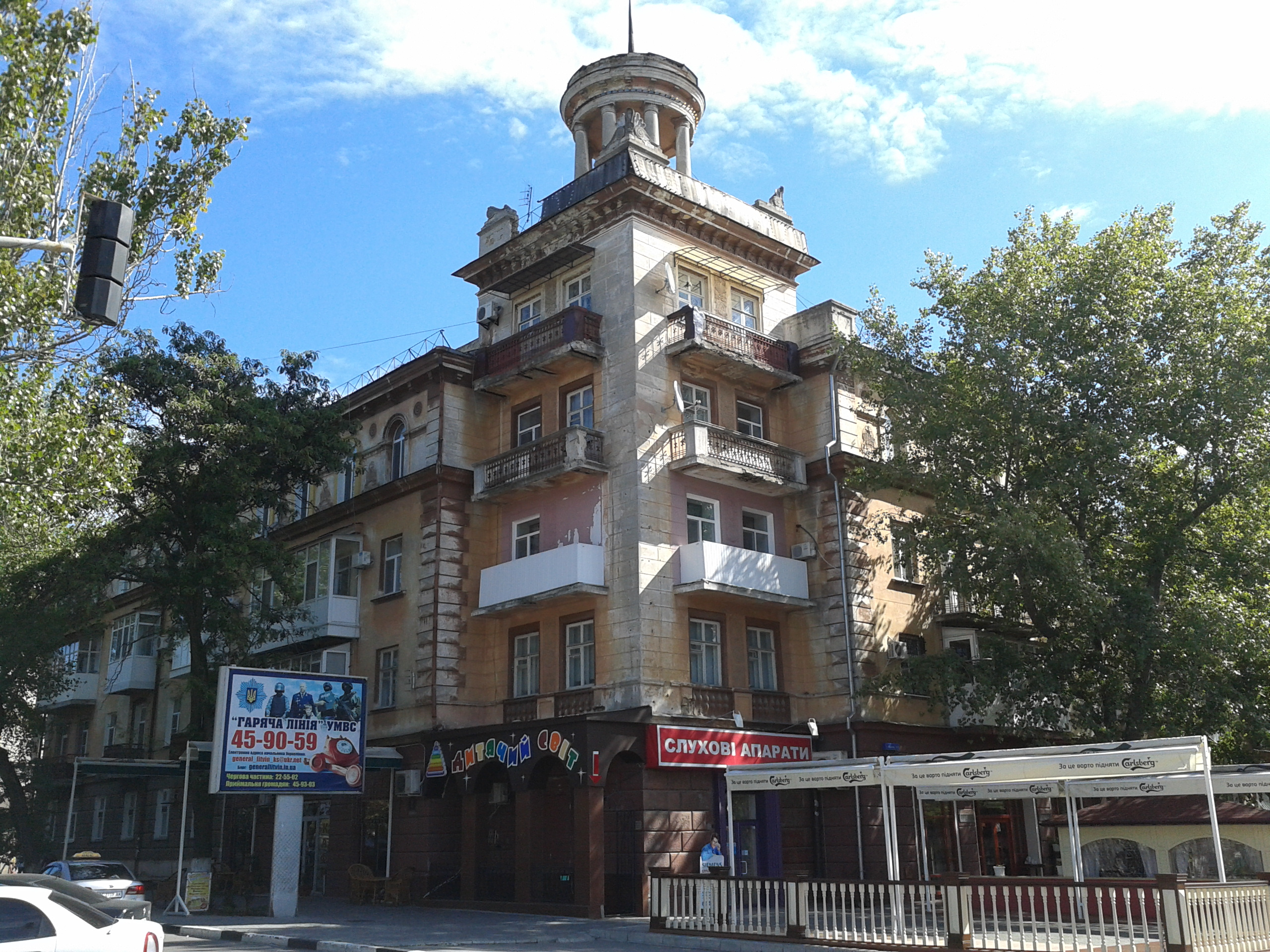 Жилий будинок, Херсон, Ушакова просп., 12/2